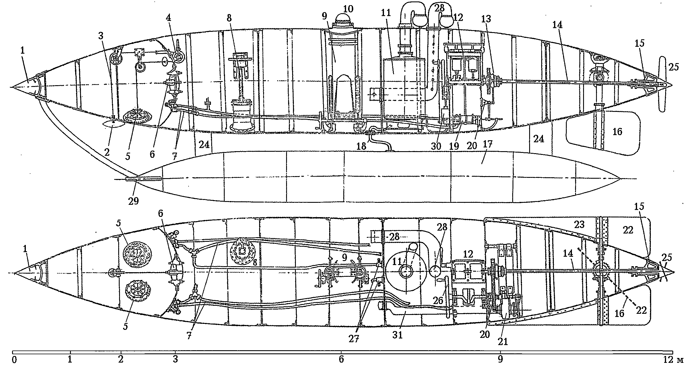 Схематические чертежи лодки Герна №4. РГАВМФ. 876. 1 - резиновый амортизатор; 2 - якорь с приводом (3) и лебедкой (4); 5 - водолазные люки; 6 - дверь в водолазное отделение; 7 - трубопроводы воздушные и водяные (показаны частично); 8- регулятор плавучести (объема корпуса); 9 - выдвижная рубка (регулятор плавучести); 10 - входной люк (колпак) с иллюминаторами; 11 - паровой котел с дымовой трубой и обратным клапаном; 12 - паровая (воздушная) машина; 13 - муфта гребного вала; 14 - гребной вал; 15 - дейдвуд; 16 - вертикальный руль; 17 - воздушный баллон на подвесе (24); 18 - воздухопровод; 19 - трюмная помпа (компрессор) с приводом от паровой машины (20) и ручным (26); 21 - вентилятор; 22 - горизонтальные рули; 23 - стабилизаторы; 25 - гребной винт; 27 - ручной насос; 28 - воздухозаборное устройство; 29 - площадка-опора для работающих в воде; 30 - питательный насос; 31 - нагнетательная труба вентилятора.